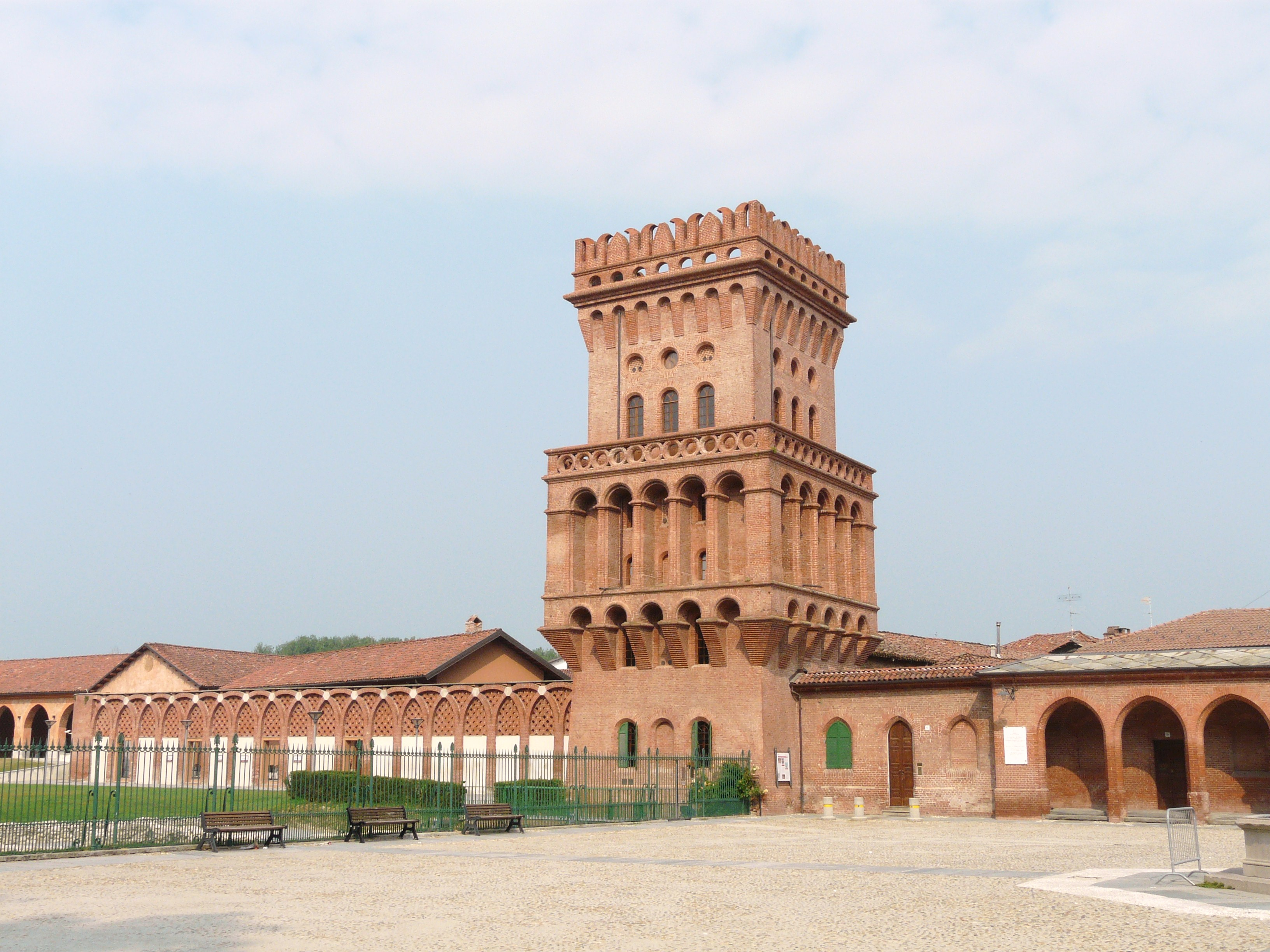 Castello, Pollenzo, Comune di Bra, Piemonte, Italia